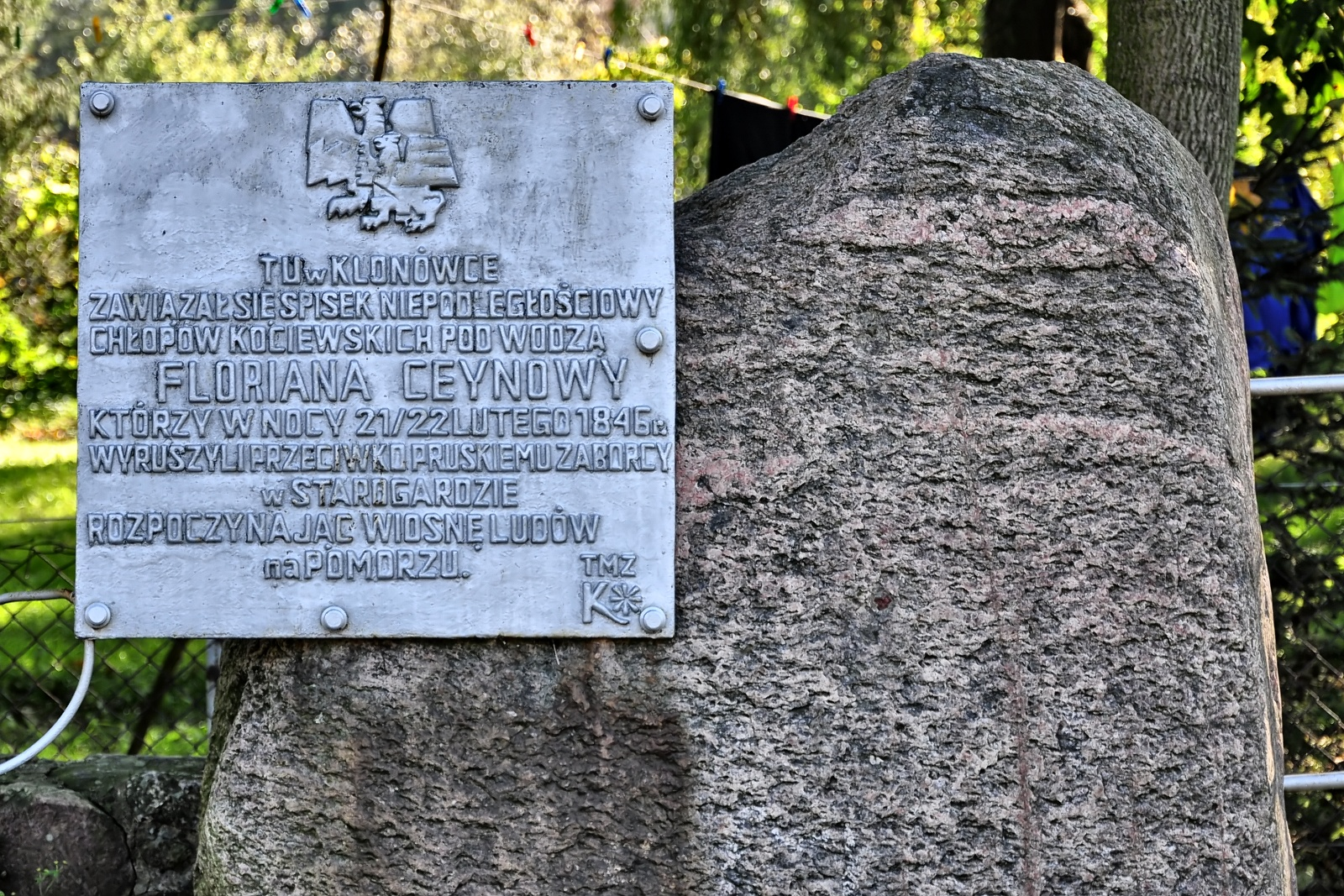 Tablica w Klonówce upamiętniająca udział Floriana Ceynowy w powstaniu antypruskim (podczas Wiosny Ludów) 1846 na Pomorzu Gdańskim.